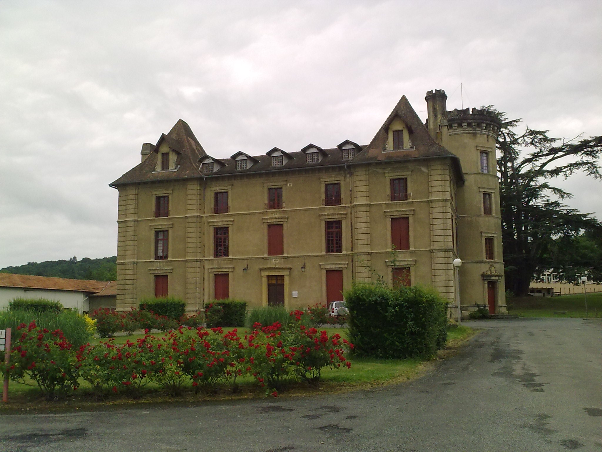 Lascazères